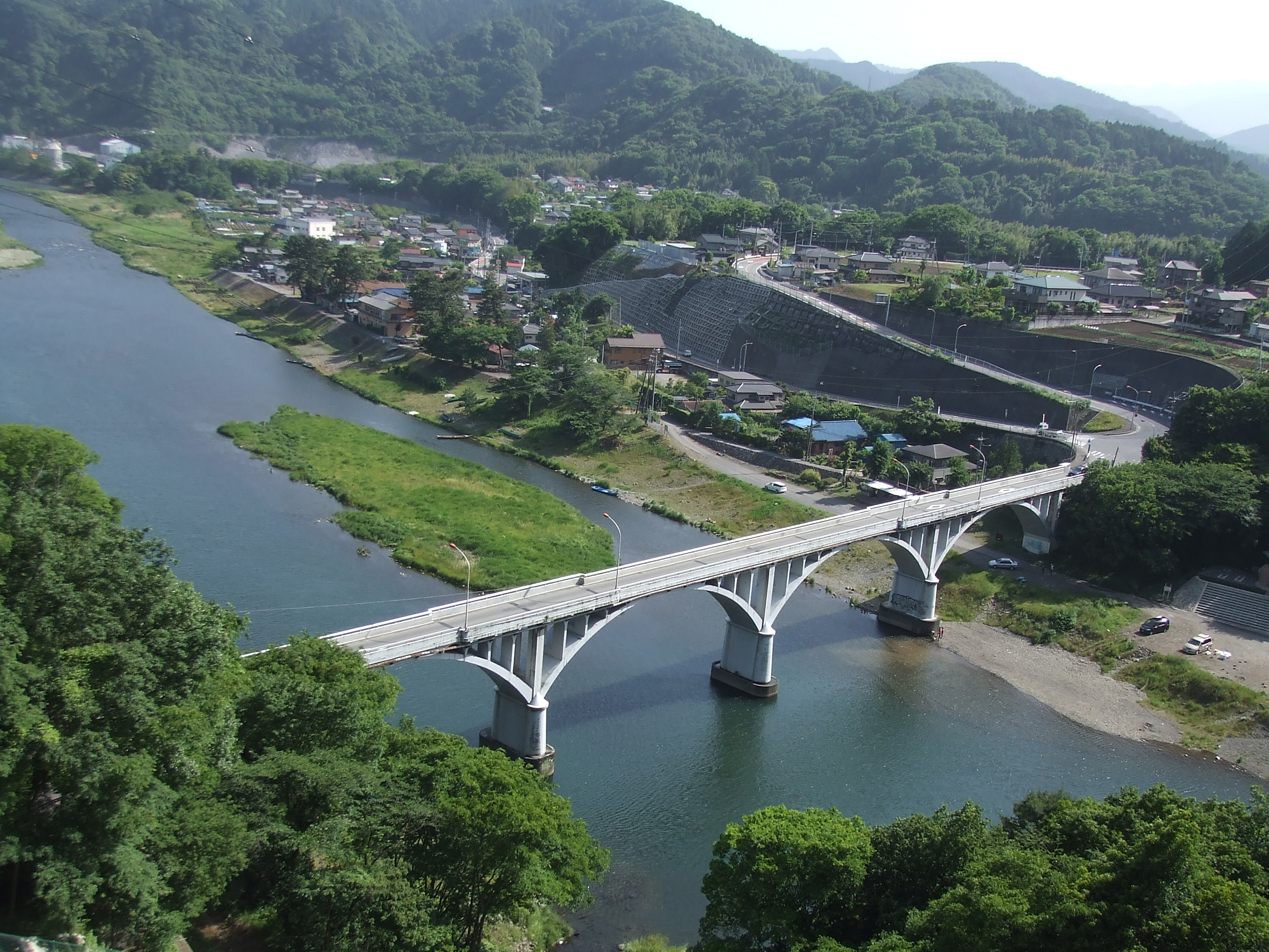 小倉橋(相模川)